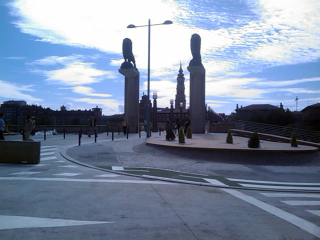 Balcón de San Lázaro